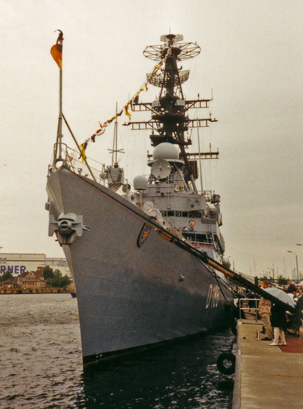 Beschreibung: Zerstörer D186 Mölders